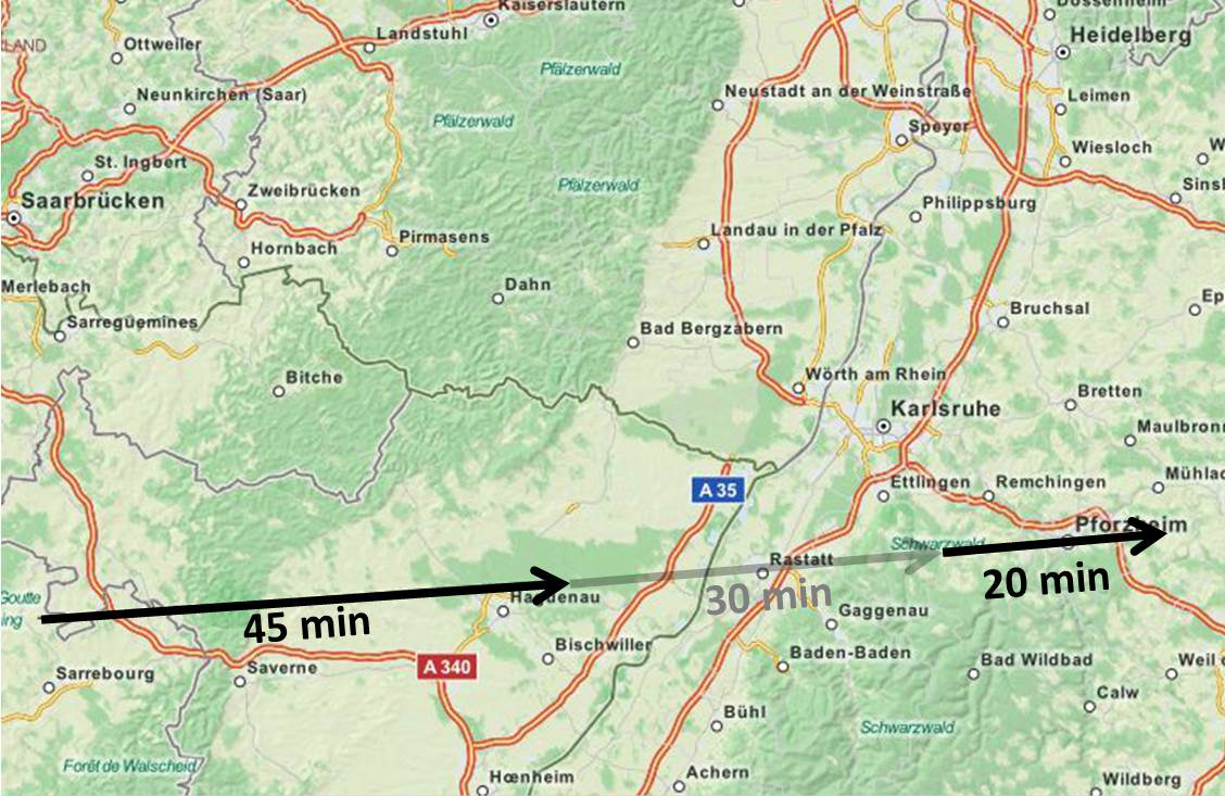 Weg des Tornados, der am 10. Juli 1968 größere Schäden in Pforzheim anrichtete. Hintergrundkarte erstellt auf